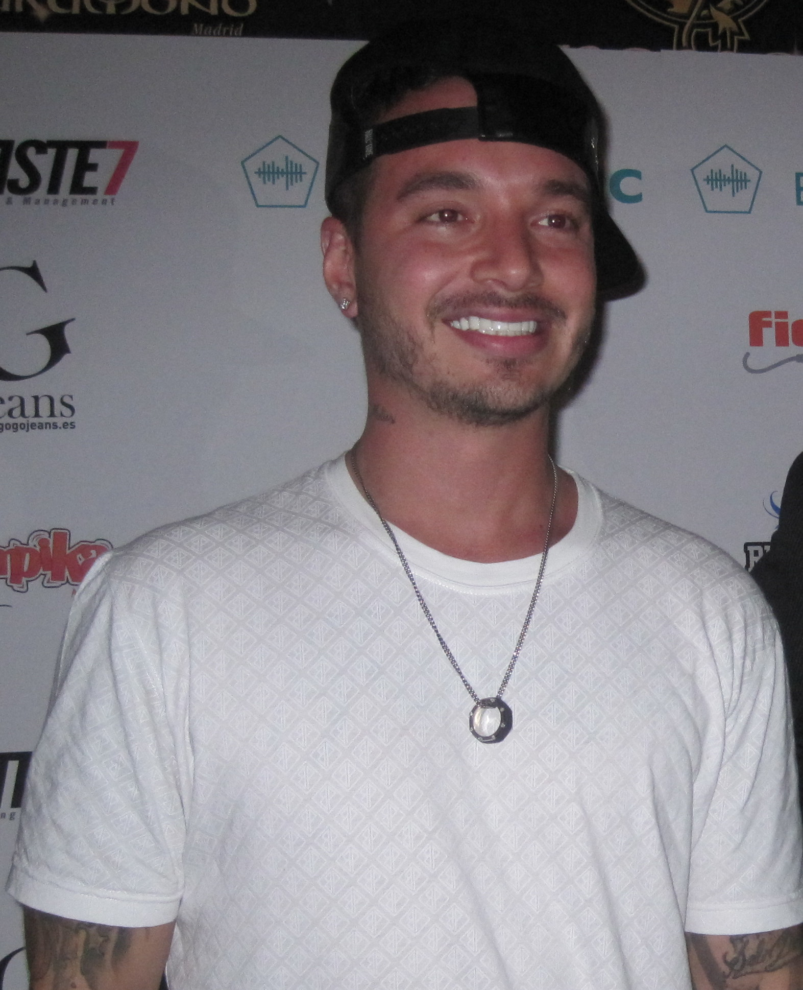 lesin valencia junto j balvin en rueda de prensa de radio energy